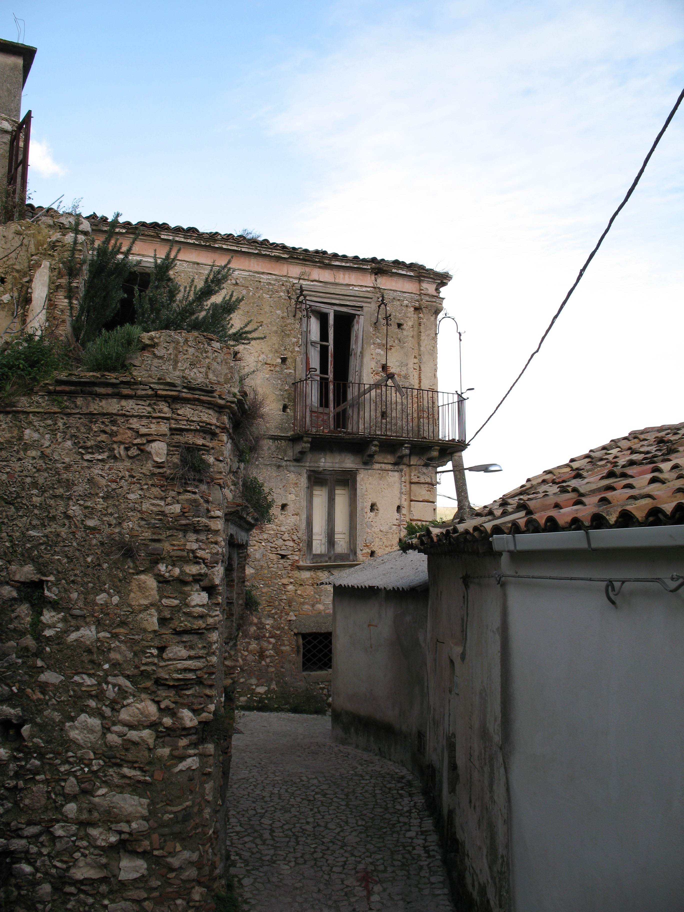 Canolo (RC), palazzo nobiliare